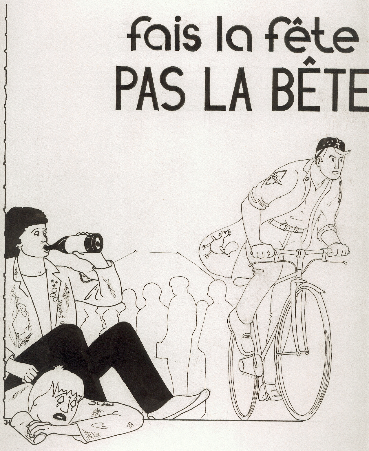 «Fais la fête, pas la bête», tel était le mot d'ordre de l'équipe de la paroisse Saint-François de Louvain-la-Neuve dans les années 1980 (création pour l'édition 1986 des 24 heures vélo mais le slogan réutilisé les années suivantes), question de dire qu'il est possible de s'amuser aux 24 Heures sans sombrer dans la beuverie.